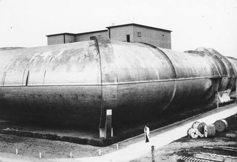 Luftströme durchrasen den Windkanal in 250 Klm. pro Stunde. Interessante Aufnahmen in der Deutschen Versuchsanstalt für Luftfahrt in Bln.-Adlershof! Die Außenansicht des großen Windkanals der Deutschen Versuchsanstalt für Luftfahrt in Bln.-Adlershof. In einer Länge von 125 m. zieht sich der riesige Rohrring durch das Gelände der deutschen Versuchsanstalt. Durch ein Gebläse im großen Windkanal werden Luftströme bis zu 250 Klm. pro Stunde erzeugt. In diesen Strom werden Flugzeugmodelle aufgehängt und durch besondere Vorrichtungen geprüft.